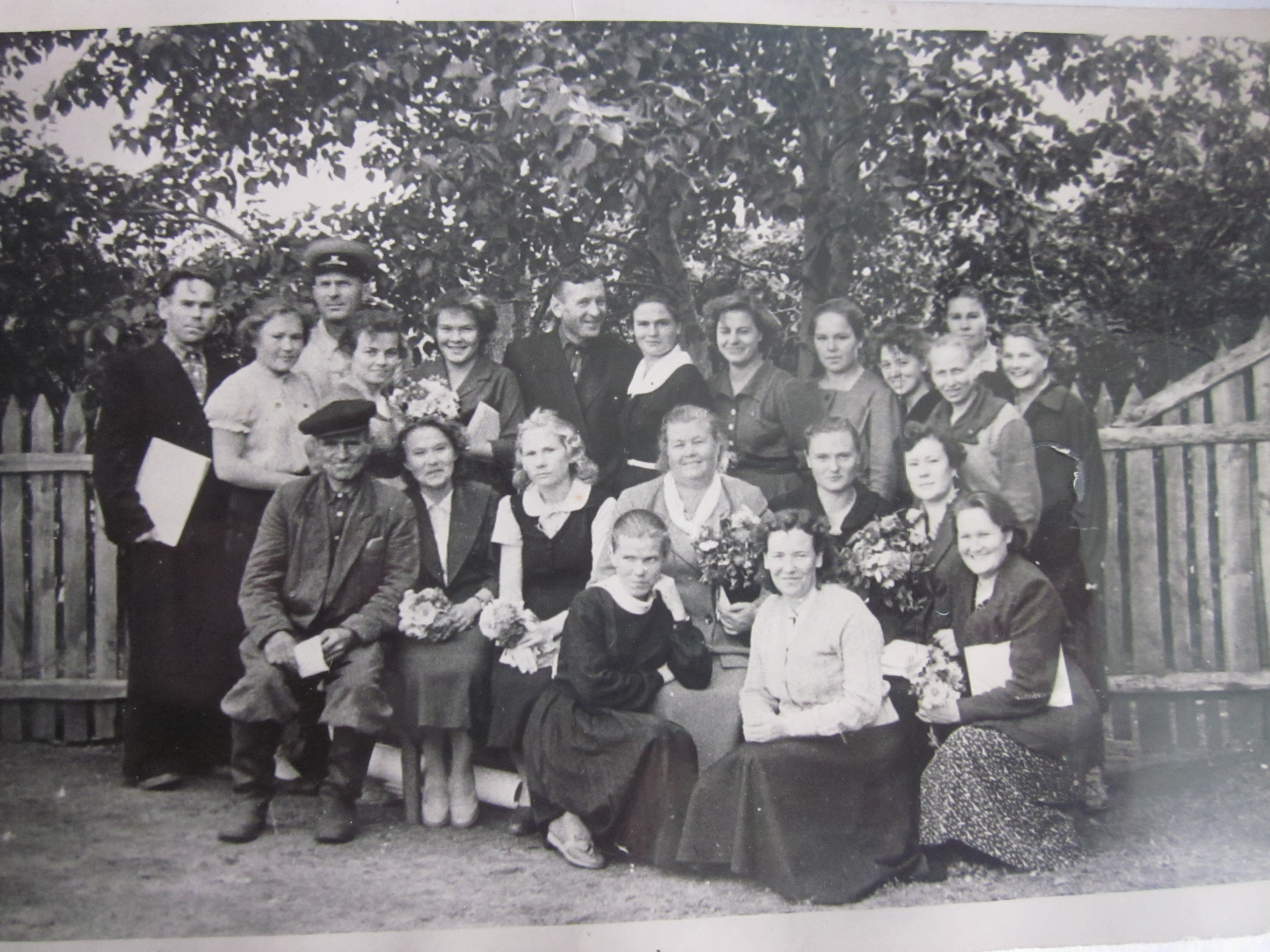 Коллектив учителей укурейской школы